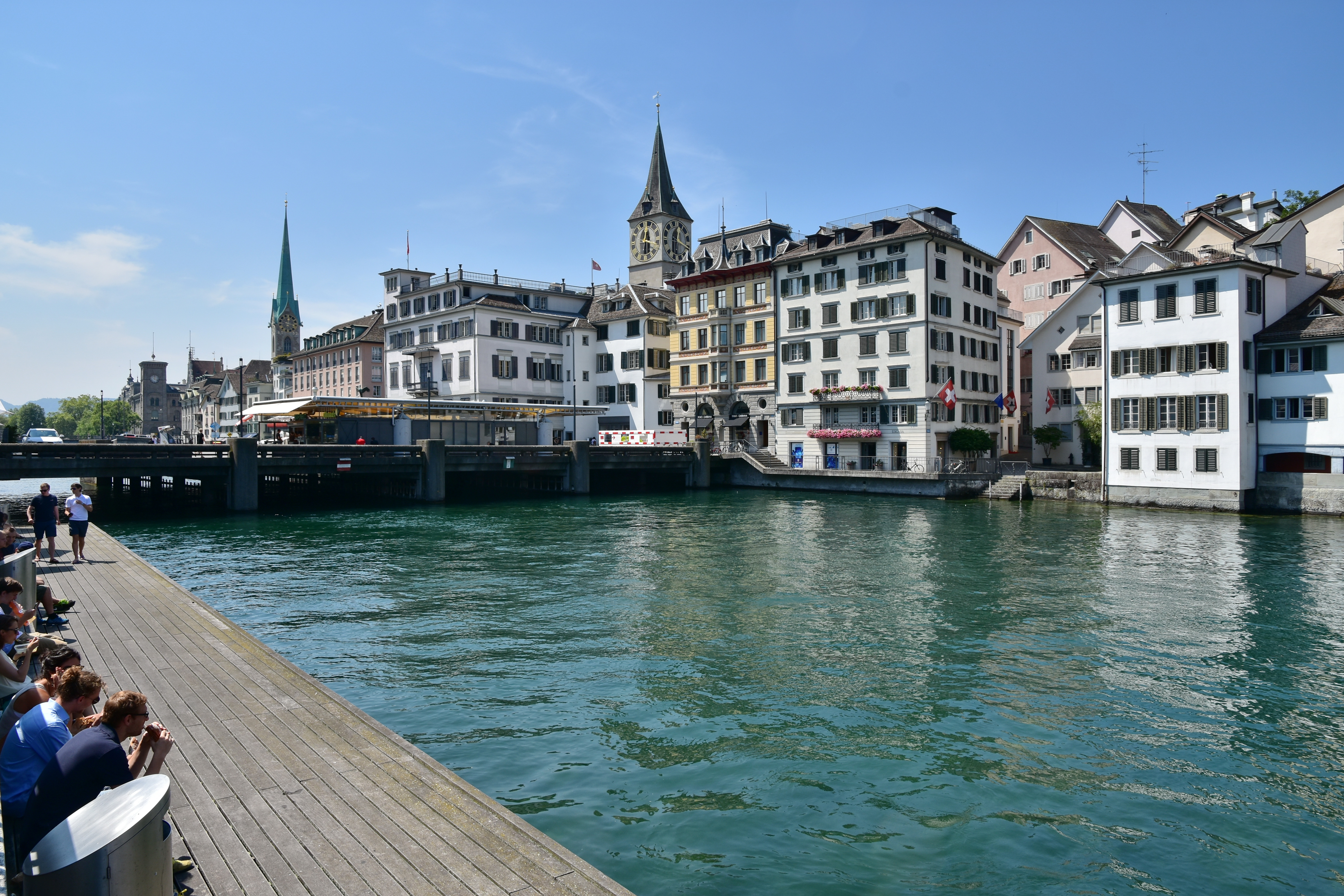 Rathausbrücke (Gmüesbrugg) and Weinplatz in Zürich (Switzerland) as seen from Limmatquai